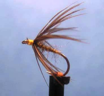 Изкуствена муха